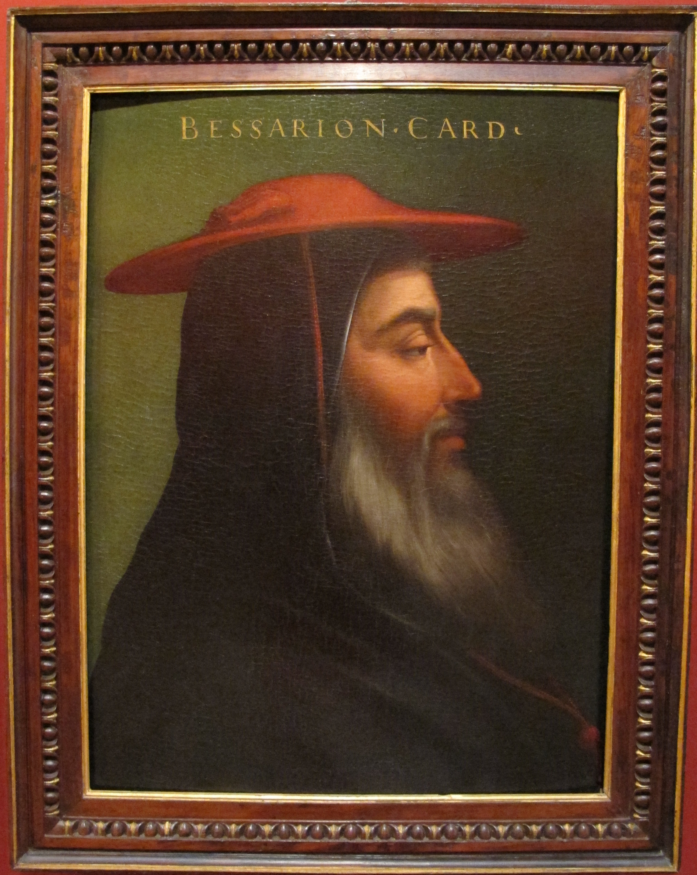 Cristofano dell'altissimo, basilio bessarione, ante 1568